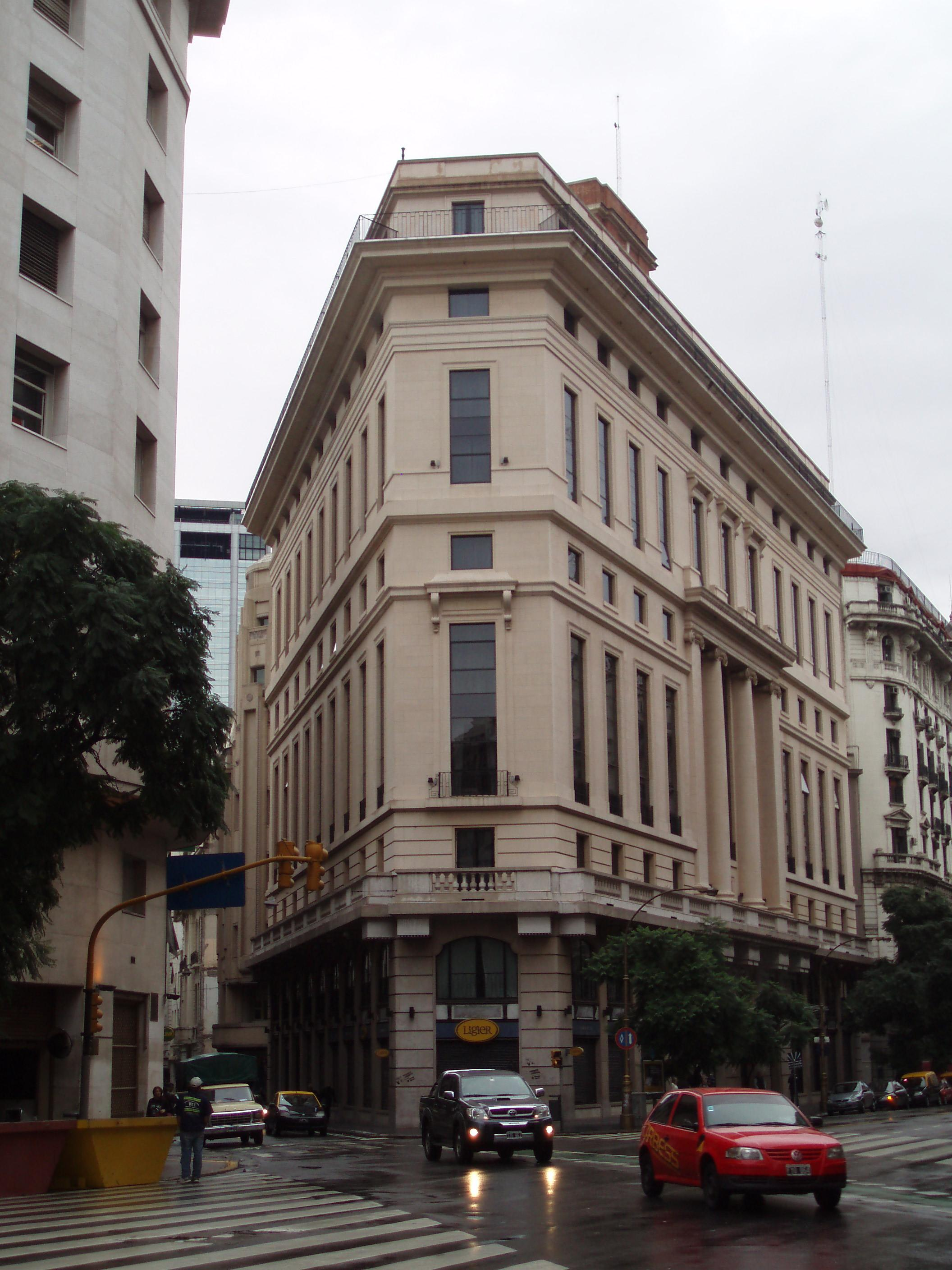 Continental Hotel de Buenos Aires. Avenida Roque Sáenz Peña (Diagonal Norte) 725. Arquitecto: Alejandro Bustillo.